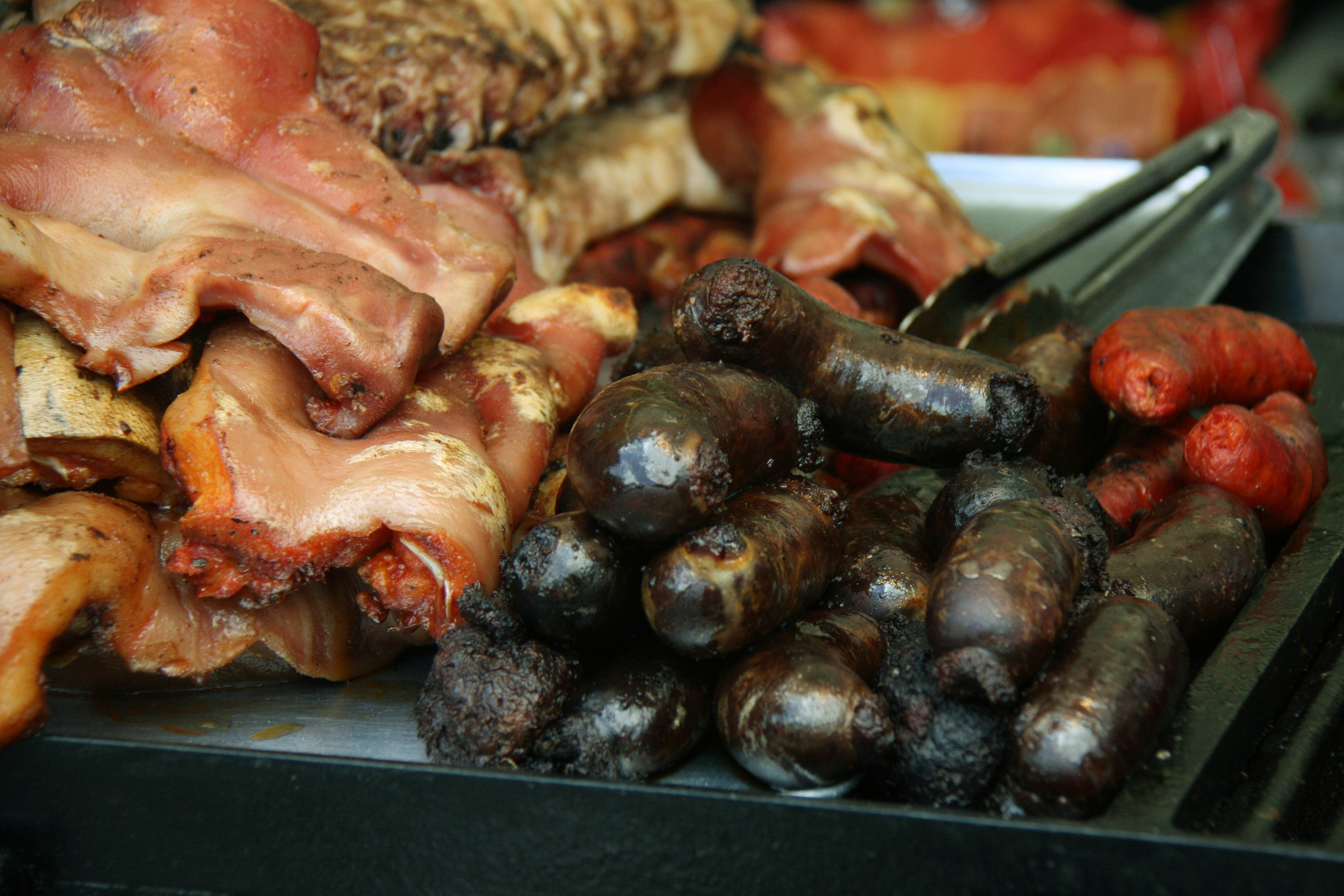 Morcillas asadas